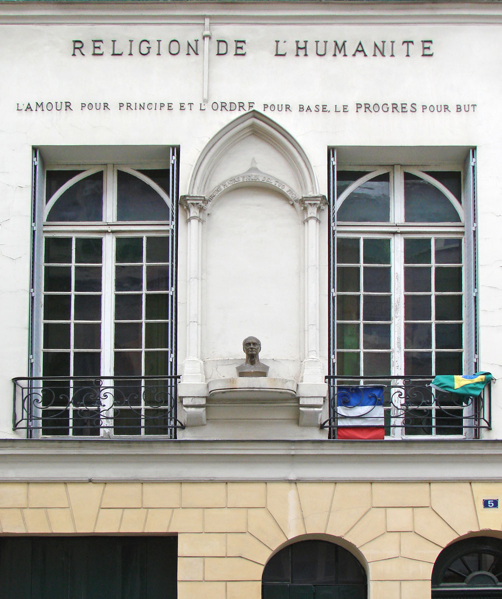 Auguste Comte (philosophe, 1798- 1857) La rencontre d'Auguste Comte et de Clotilde de Vaux eut lieu en 1845, elle mourut un an plus tard rue Payenne, la maison voisine a été transformée en Chapelle positiviste par l'Eglise positiviste du Brésil (voir la photo). Wikipedia sur l'Eglise de l'Humanité